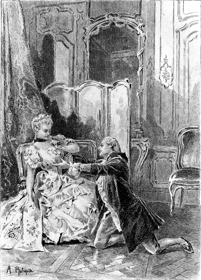 Title page of Honoré de Balzac's Sarrasine (1831).